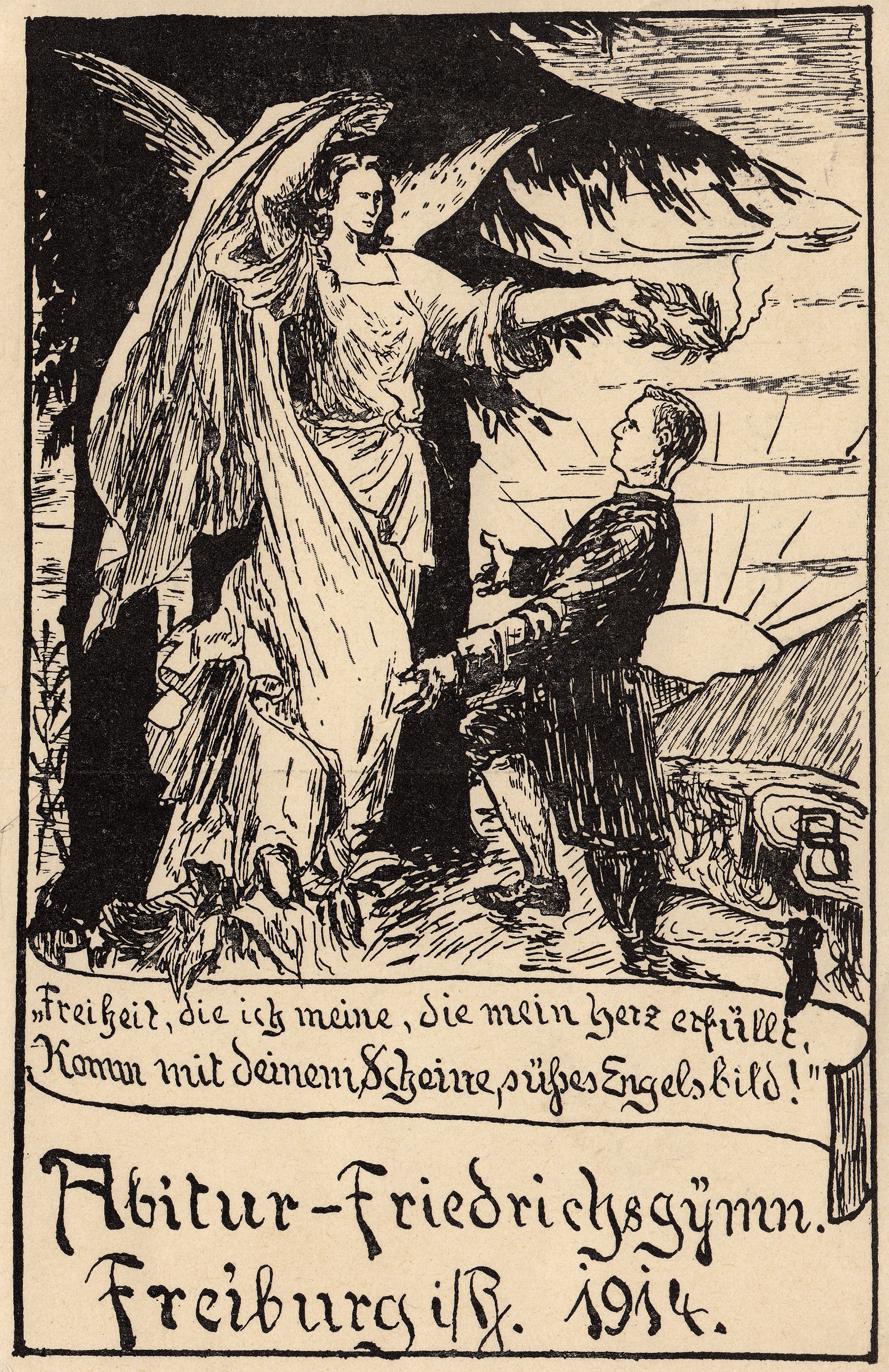 Abiturpostkarte Friedrich-Gymnasium Freiburg (im Breisgau) Jahrgang 1914. Schülerarbeit des Friedrich-Gymnasiums Freiburg (im Breisgau) [FG].